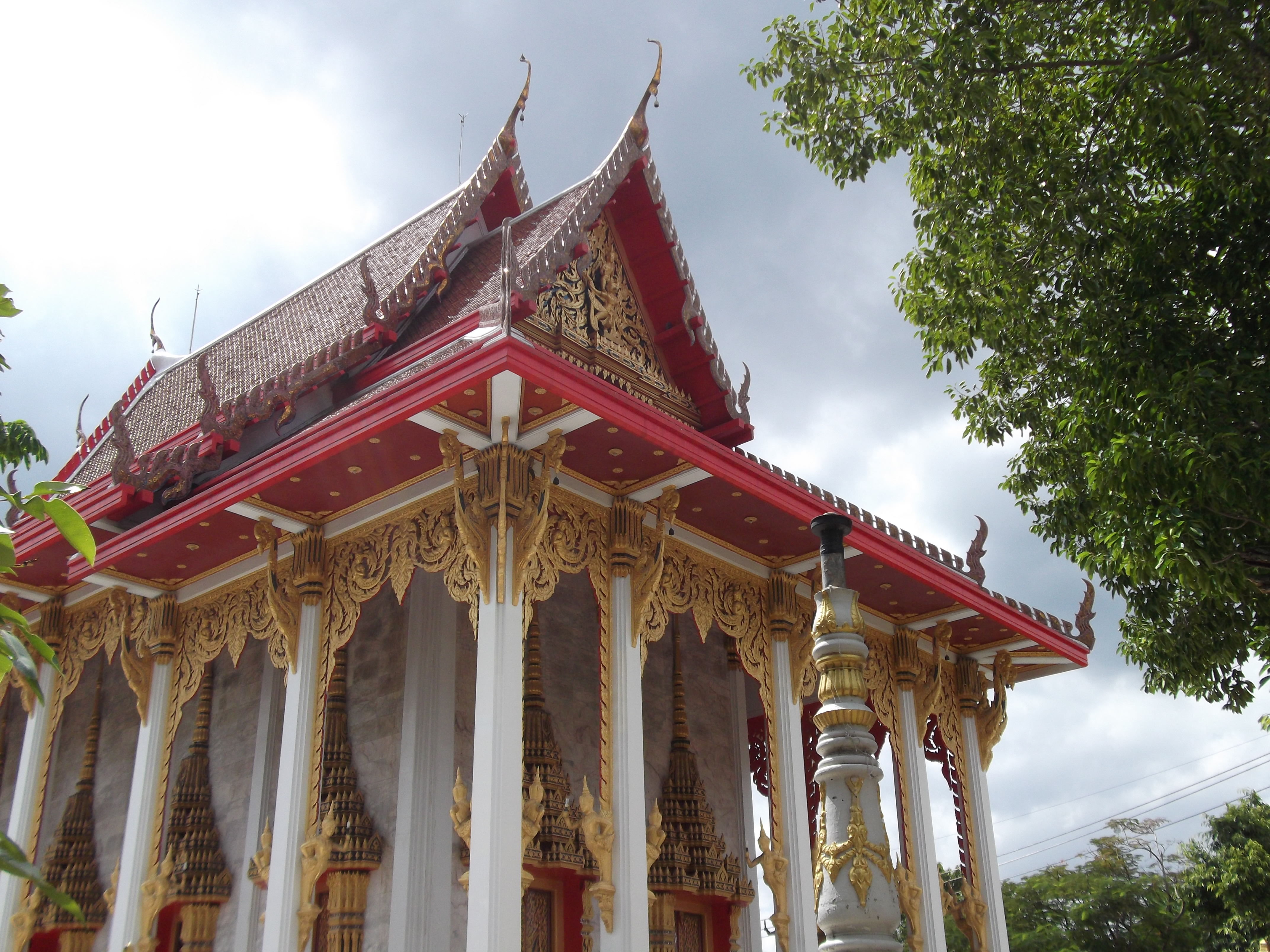 วัดสังฆราชา